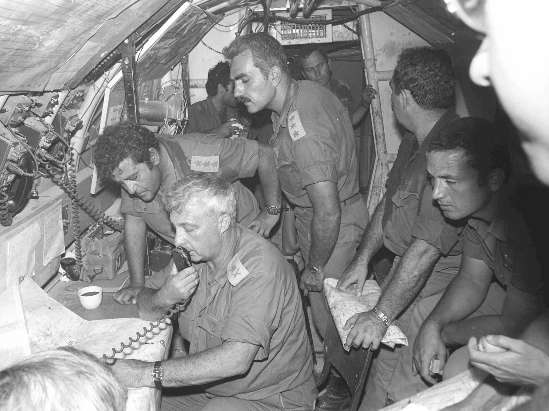 מלחמת יום הכיפורים. בתוך התעוז ששימש כמפקדה של האוגדונר אלוף אריאל שרון. מעליו, רוכן- אל"מ יעקב עקנין, מפקד האגד הארטילרי באוגדה 143. לימינו ומאחורי מפקד האוגדה - אל״מ יהושע שגיא, קמ"ן האוגדה .